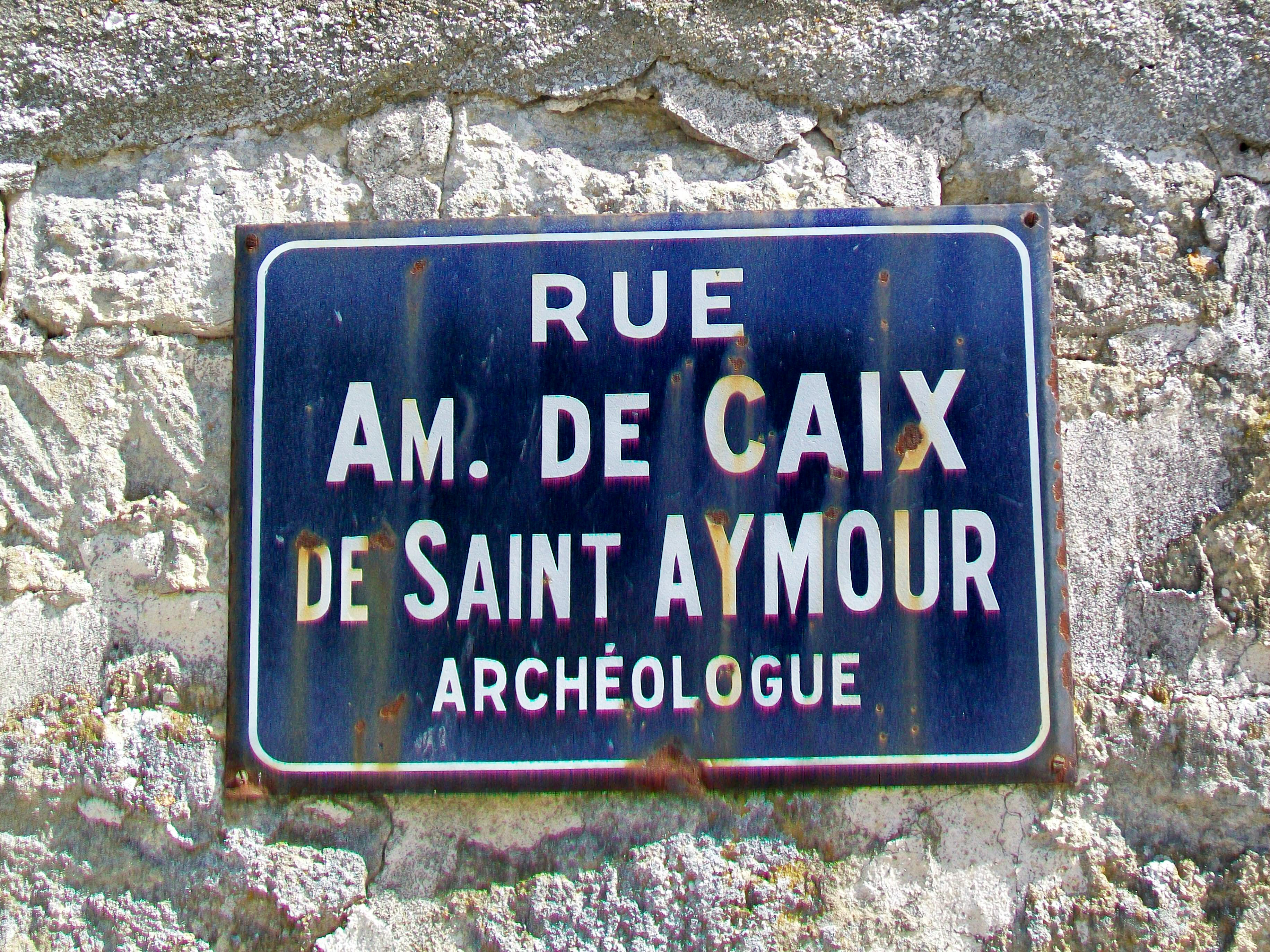 Plaque de la rue Amédée de Caix de Saint-Aymour (Senlis 1843 - Senlis 1921, diplomé de l'école des Chartes). Le vicomte de Caix de Saint-Aymour a fouillé l'allée couverte du cimetière des Anglais en 1867.